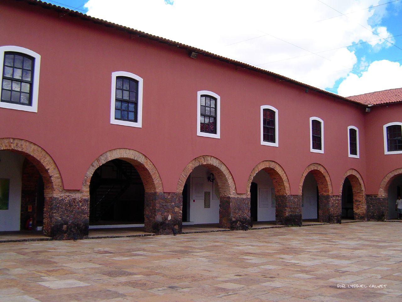 O Convento das Mercês,situado na Praia Grande, é uma grandiosa obra da arquitetura religiosa mercedária inaugurada em 1654 pelo Padre Antônio Vieira. O Convento abriga a Fundação da Memória Republicana, o Memorial José Sarney, o Centro Modelador de Pesquisa da História Republicana e o Instituto da Amizade dos Povos de Língua Portuguesa.